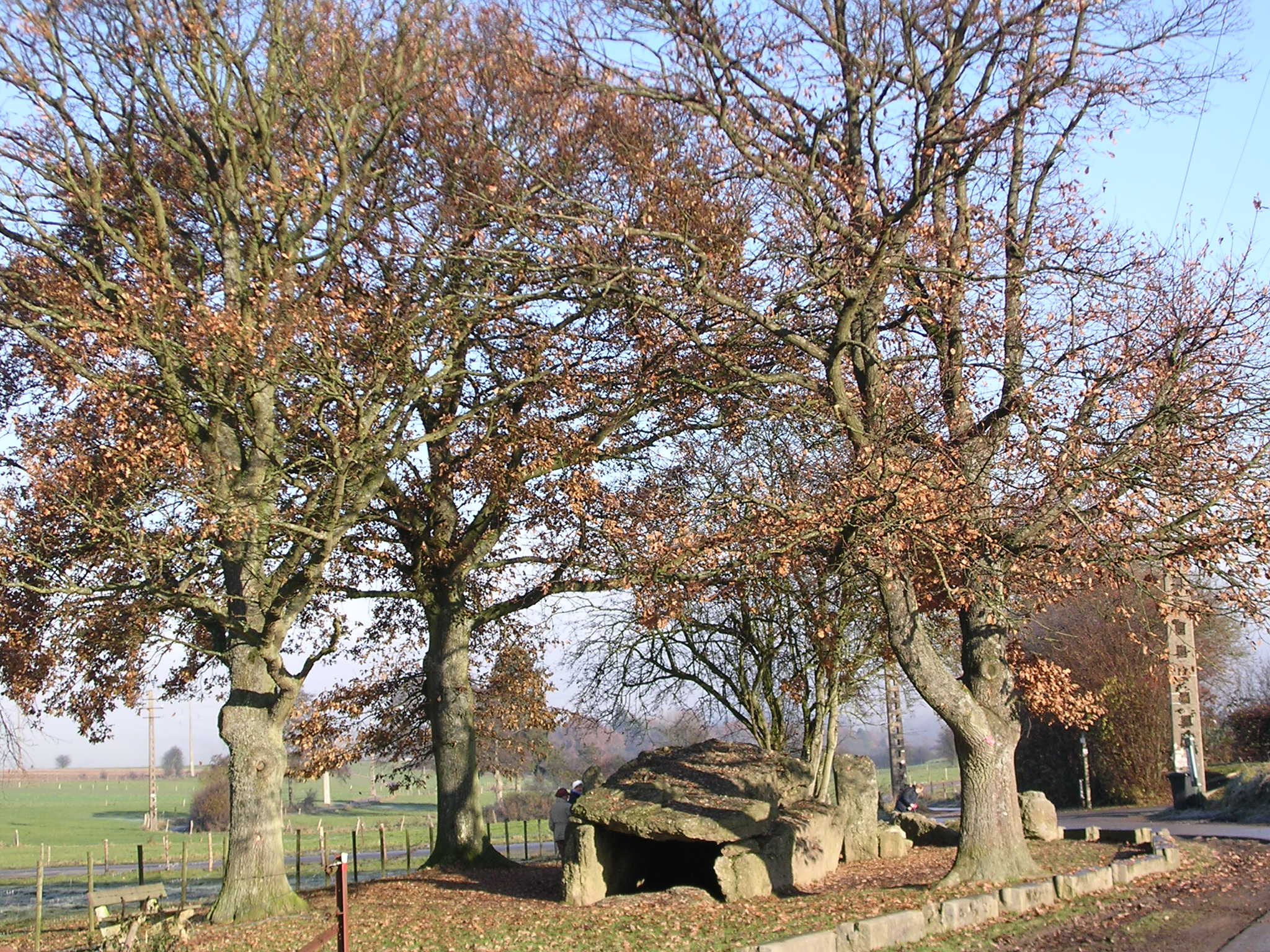 Dolmens situés sur le territoire de la commune de Wéris - dolmen dit de Weris ou dolmen Nord